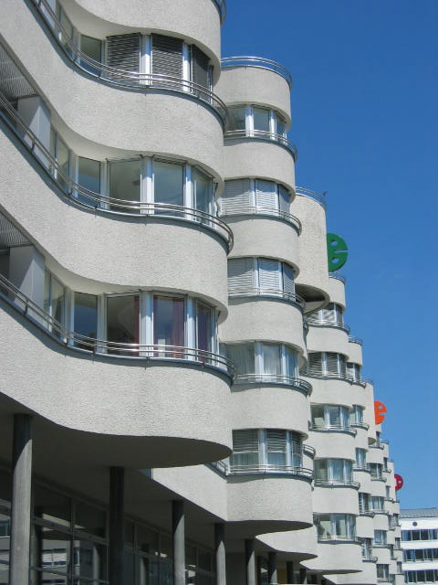 Zuerich Binzmuehle Fassade (Architect Justus Dahinden)